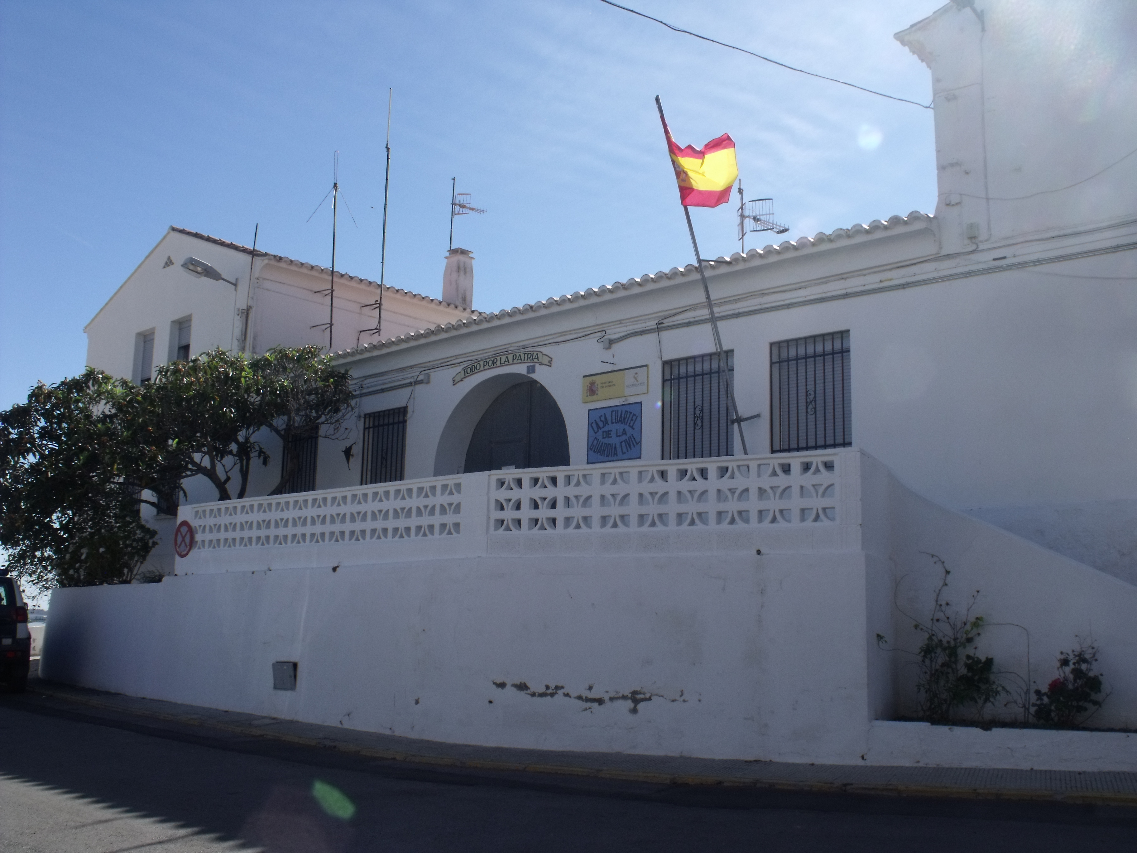 Caserna de la Guardia Civil. Almenara.